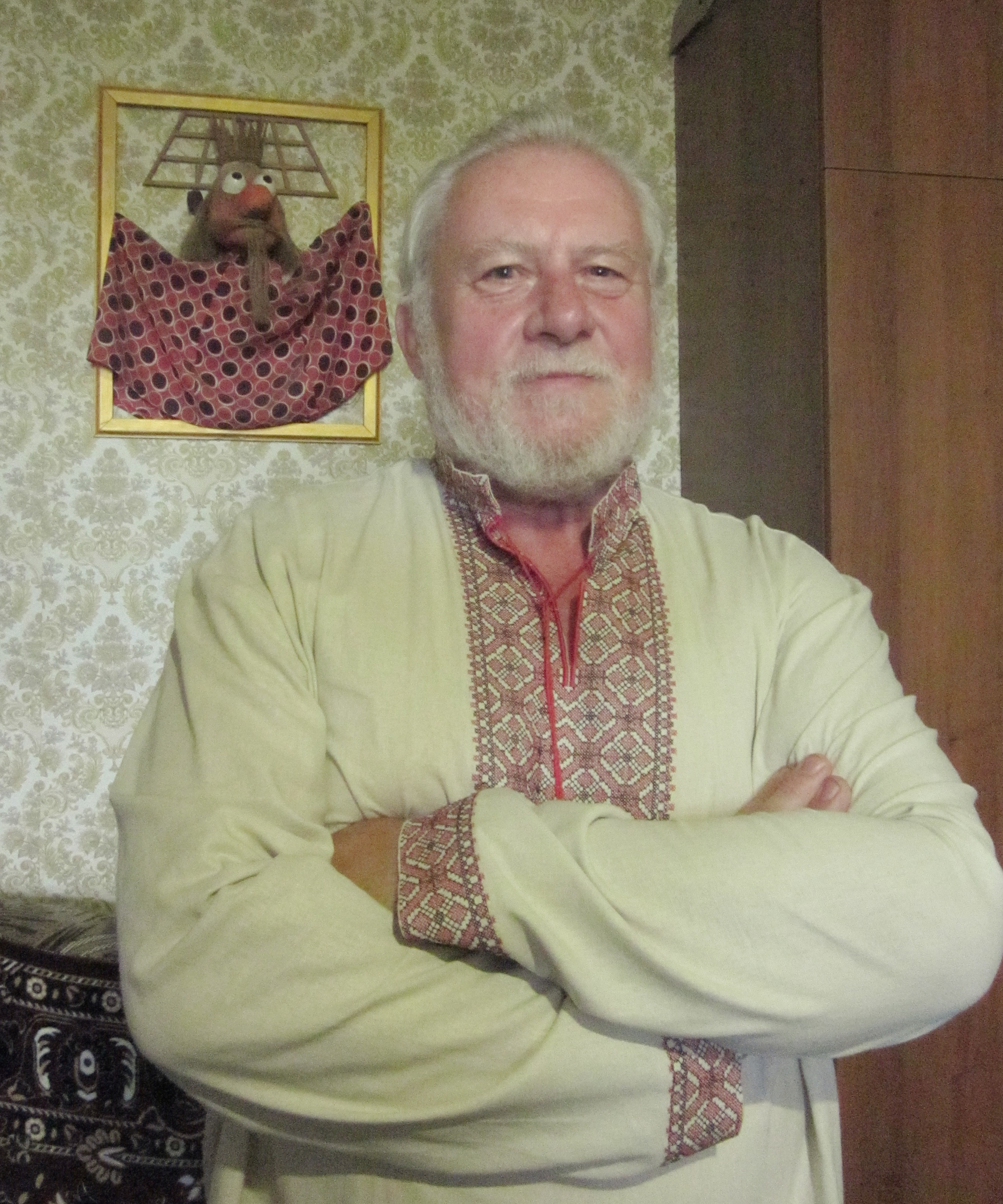 Володимир Петрович Хорунжий